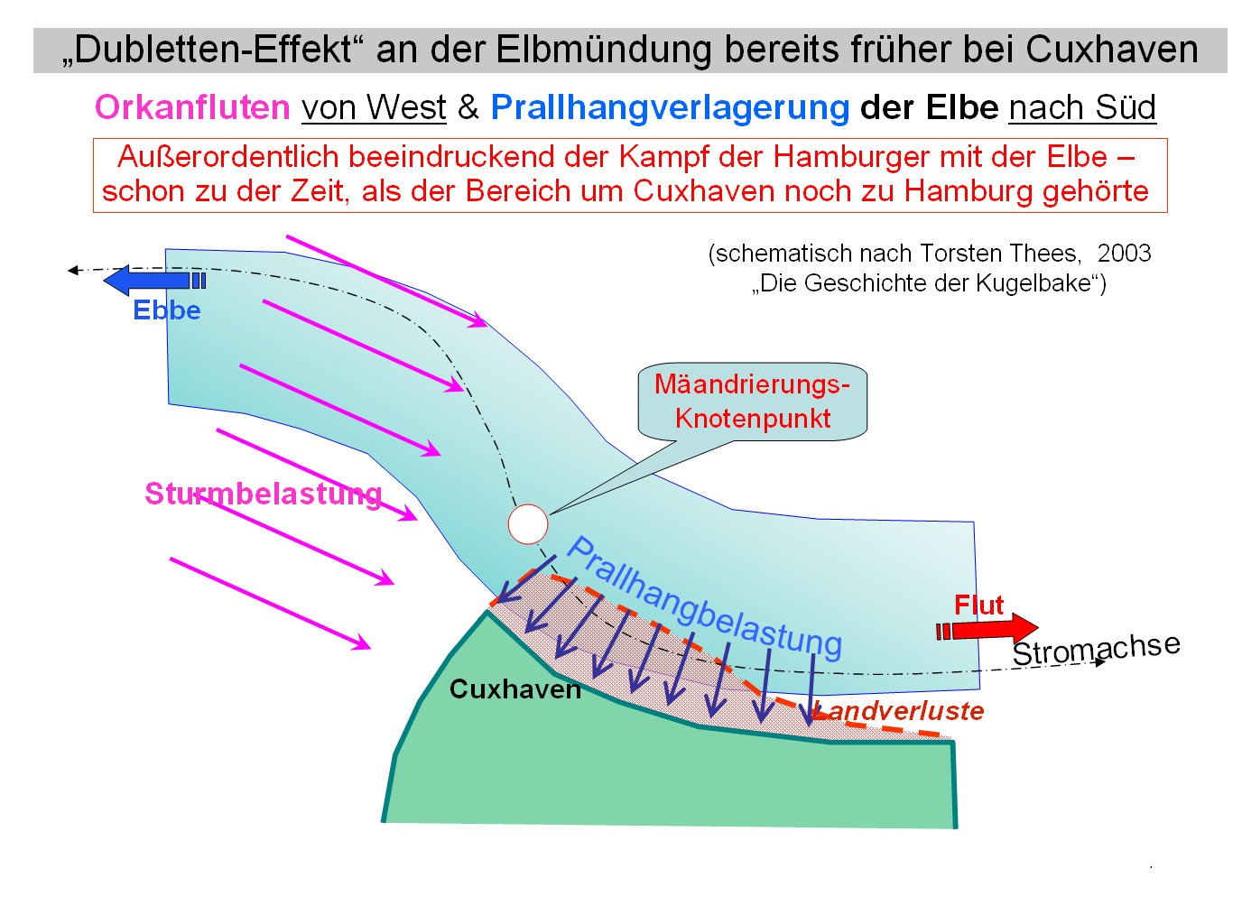 Doubletteneffekt an der Elbmündung